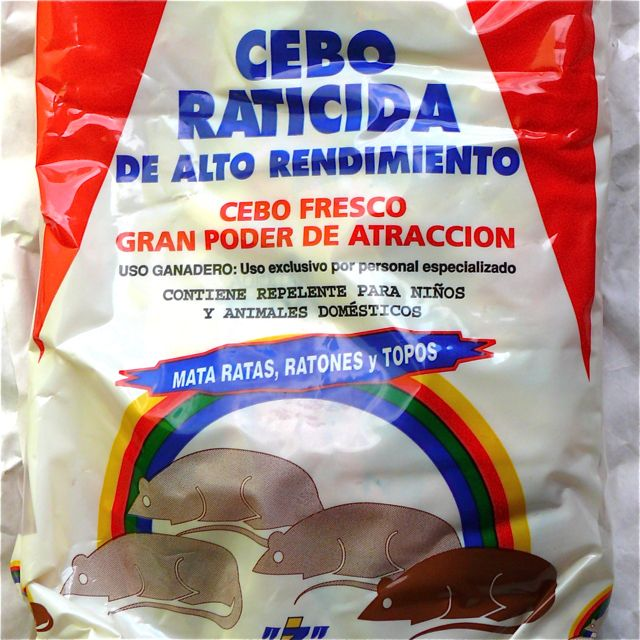 Bolsa de cebo raticida: Clorofacinona (anticoagulante de primera generación) en parafina aromatizada, utilizado para combatir la plaga de topillos (Microtus arvalis astorianus) en Castilla y León, 2007